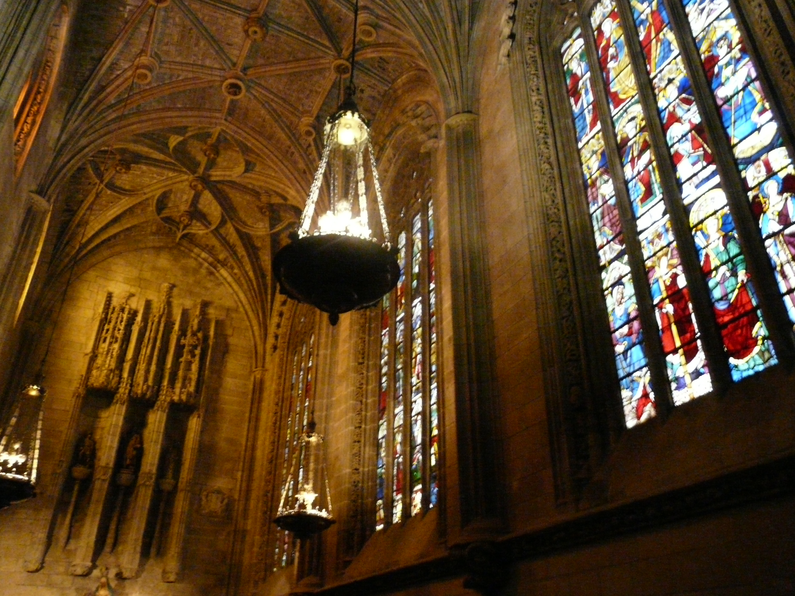 Capilla de Santiago, catedral de León